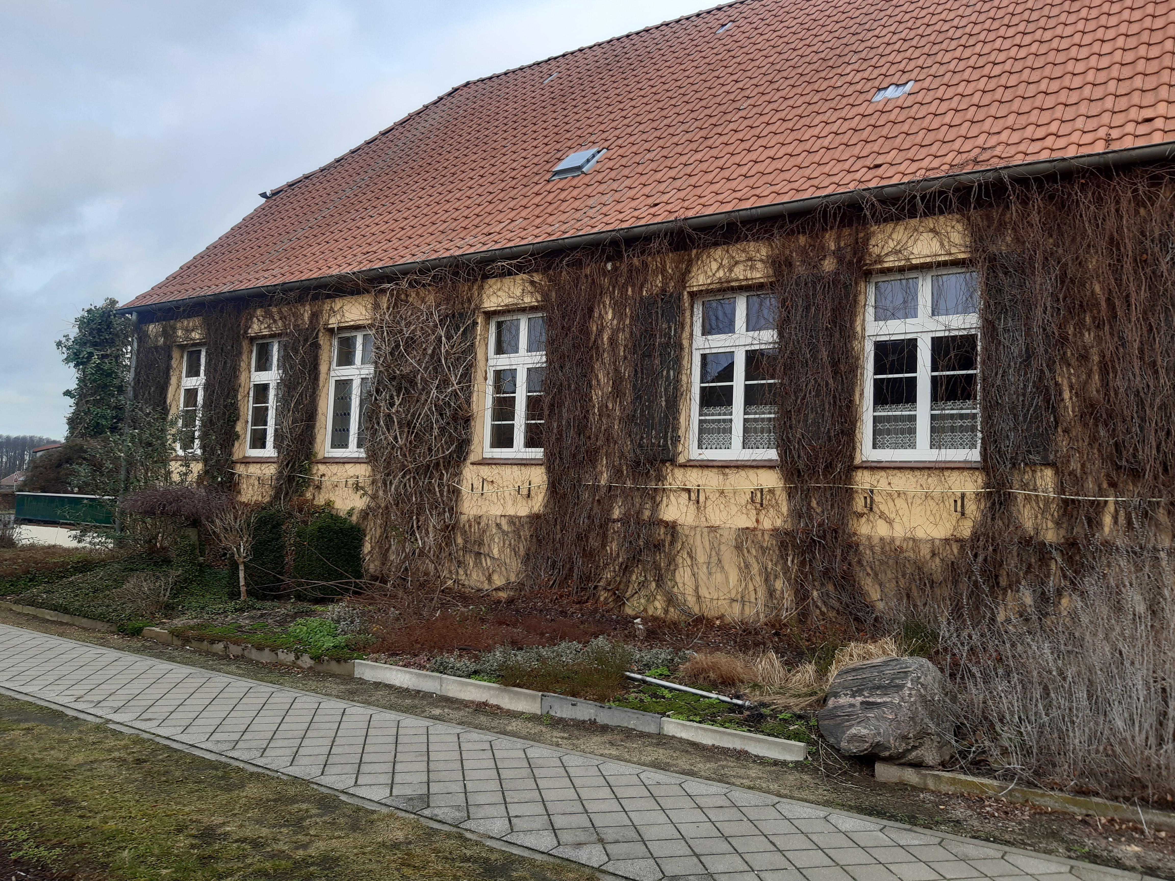 Wohnhaus